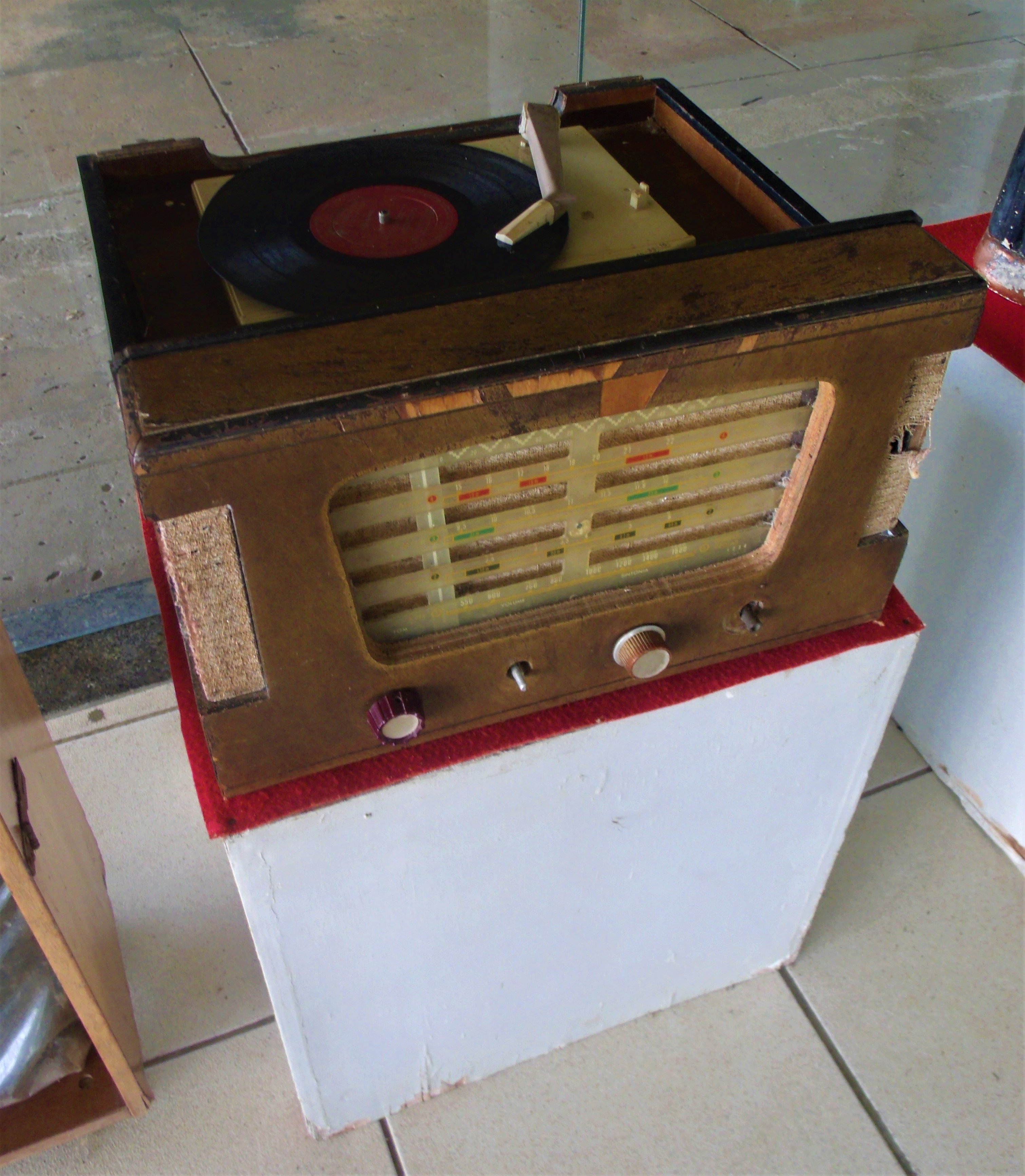 Antiga radiola da marca Semp (sigla para Sociedade Eletromercantil Paulista) no Museu do Monumento Nacional da Batalha do Jenipapo.